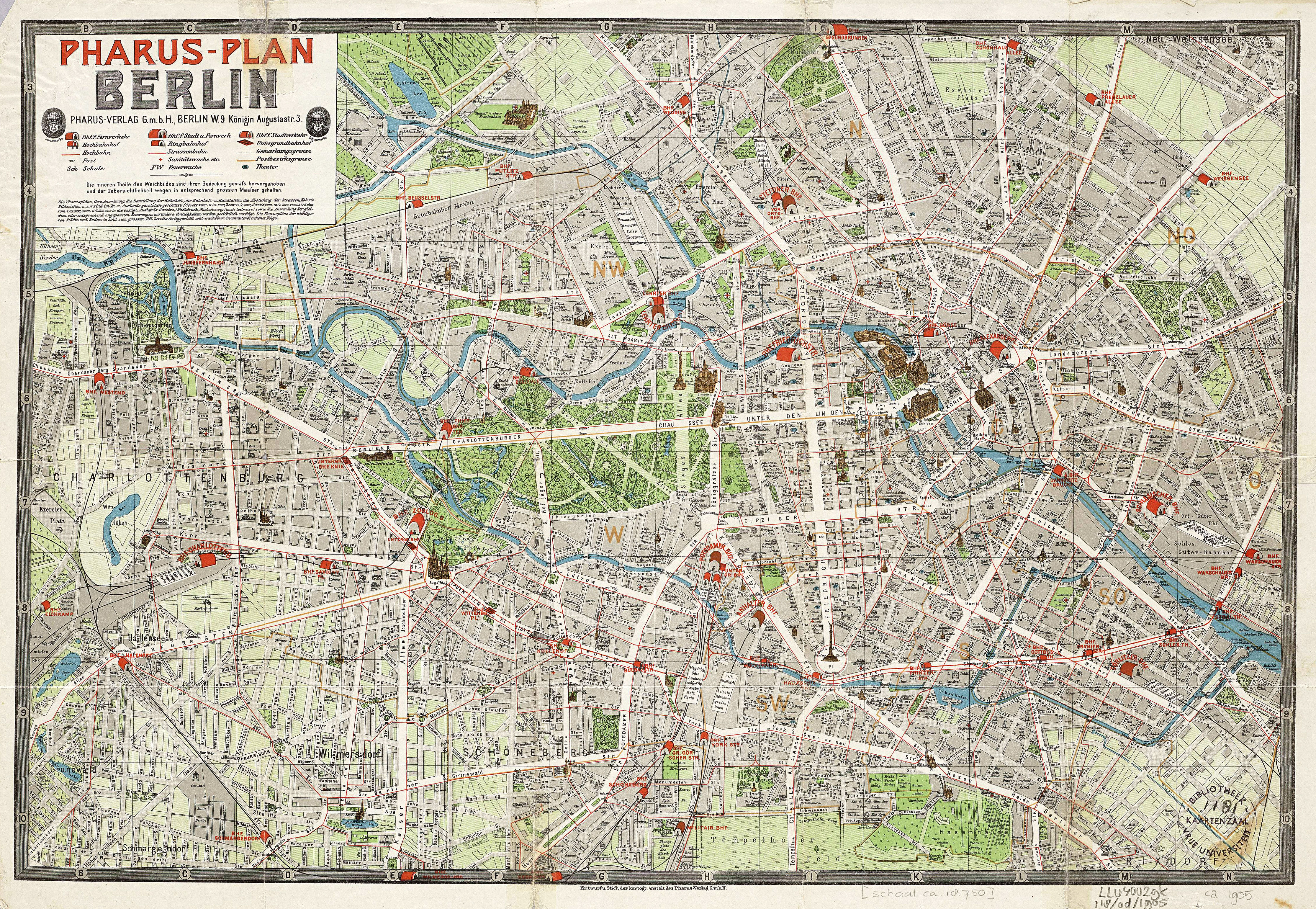 Pharus-Plan Berlin Pharus-Verlag G.m.b.H., Berlin W.9 Königin Augustastr. 3. Format: 49,0 x 32,9 cm (nur der Plan) Maßstab: 1:20.000 Farblithografie Sog. "Kleine Ausgabe". Der Titel steht 3-zeilig links oben in einem abgegrenzten Rechteck - die letzte Zeile ist flankiert von zwei Pharus-Schutzmarken. Unter dem Titel eine Legende mit 15 Zeichenerkärungen. Im schraffierten Rand sind Planquadrate von B-N und 3-10 dargestellt. Das Fehlen der Planquadrate A/1-2 ist ein Kennzeichen der "kleinen Ausgabe" des Pharus-Plan von Berlin. Unter der Karte steht mittig "Entwurf und Stich der kartogr. Anstalt des Pharus-Verlag G.m.b.H."